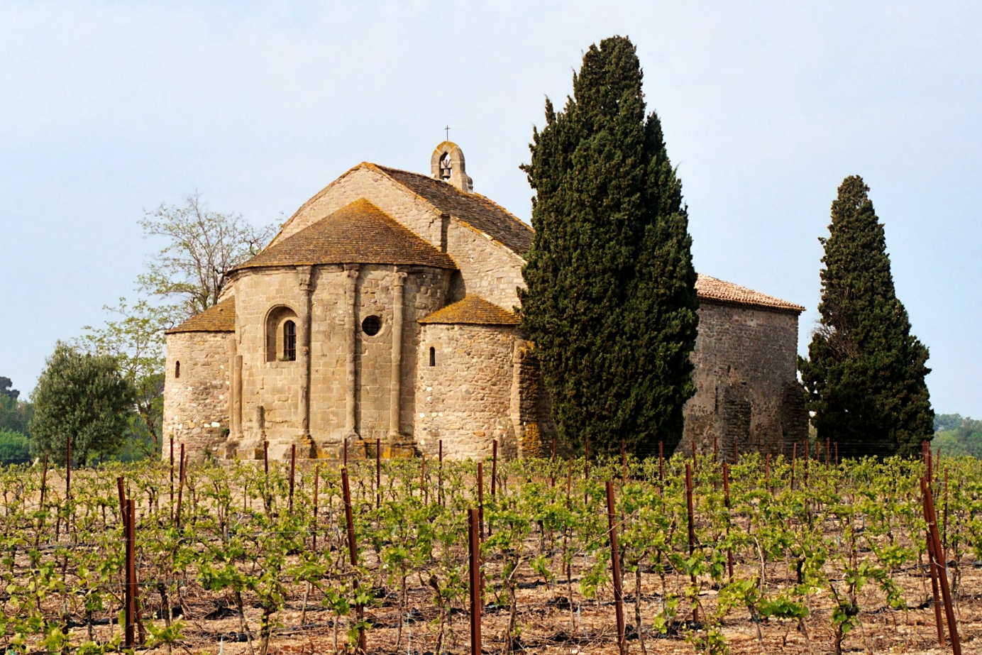 France - Languedoc - Aude - Azille - Chapelle Saint-Étienne de Vaissière